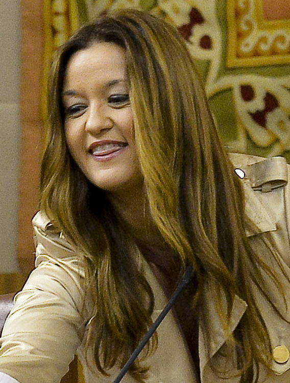 La Comunidad Autónoma de Andalucía ha iniciado su X Legislatura con la constitución del Parlamento, que será presidido por el diputado socialista por Córdoba Juan Pablo Durán. El nuevo presidente ha sido elegido por mayoría simple, con los votos a favor de los 47 diputados de su grupo, y en segunda votación, al no haber conseguido la mayoría absoluta necesaria que establece el reglamento de la Cámara en primera votación. En la imagen se ve a Verónica Pérez estrechando la mano a Susana Díaz.